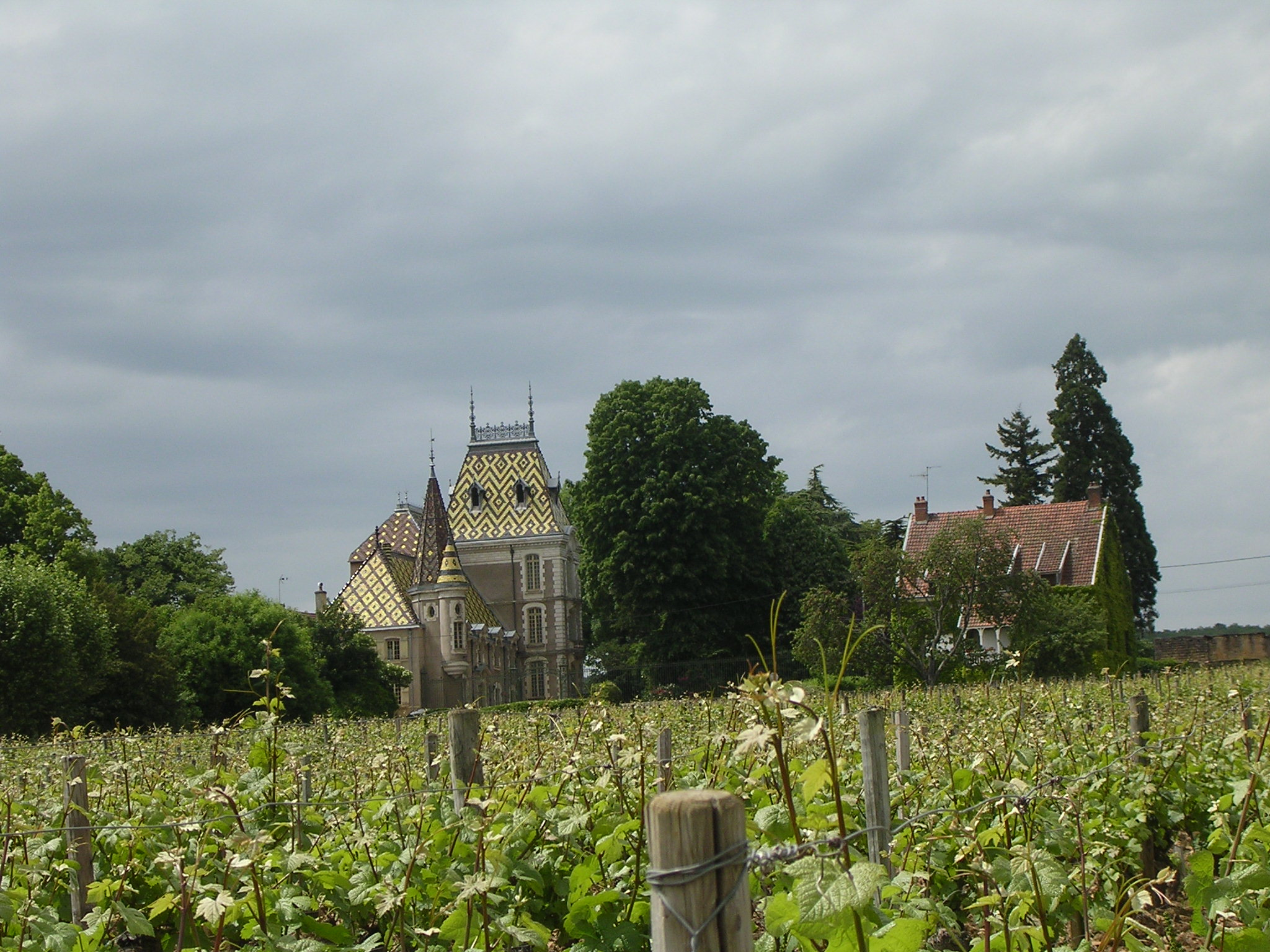 Aloxe Corton. Château Corton-André. Domaine viticole à Aloxe-Corton (Bourgogne, France)